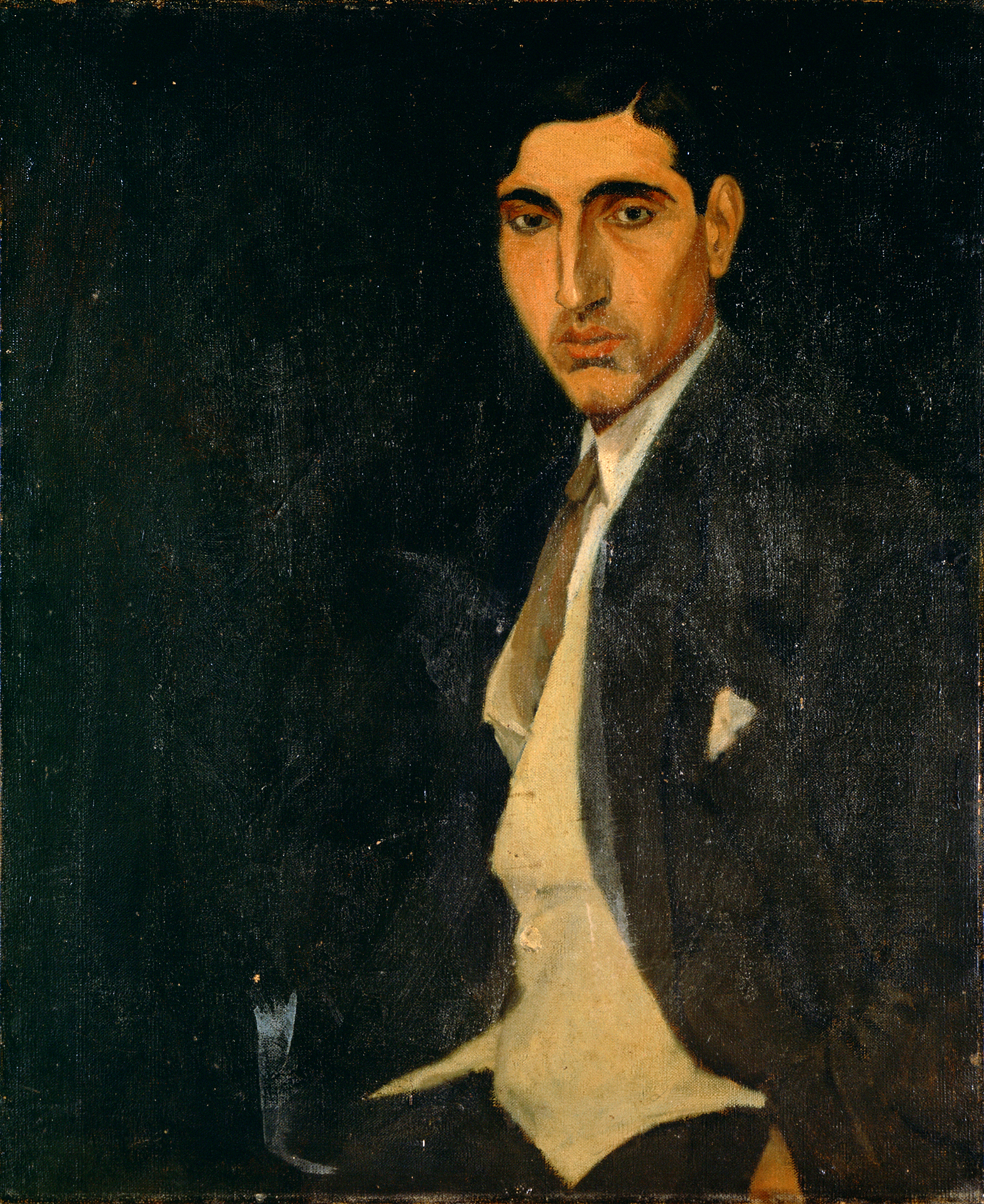 Auto-Retrato